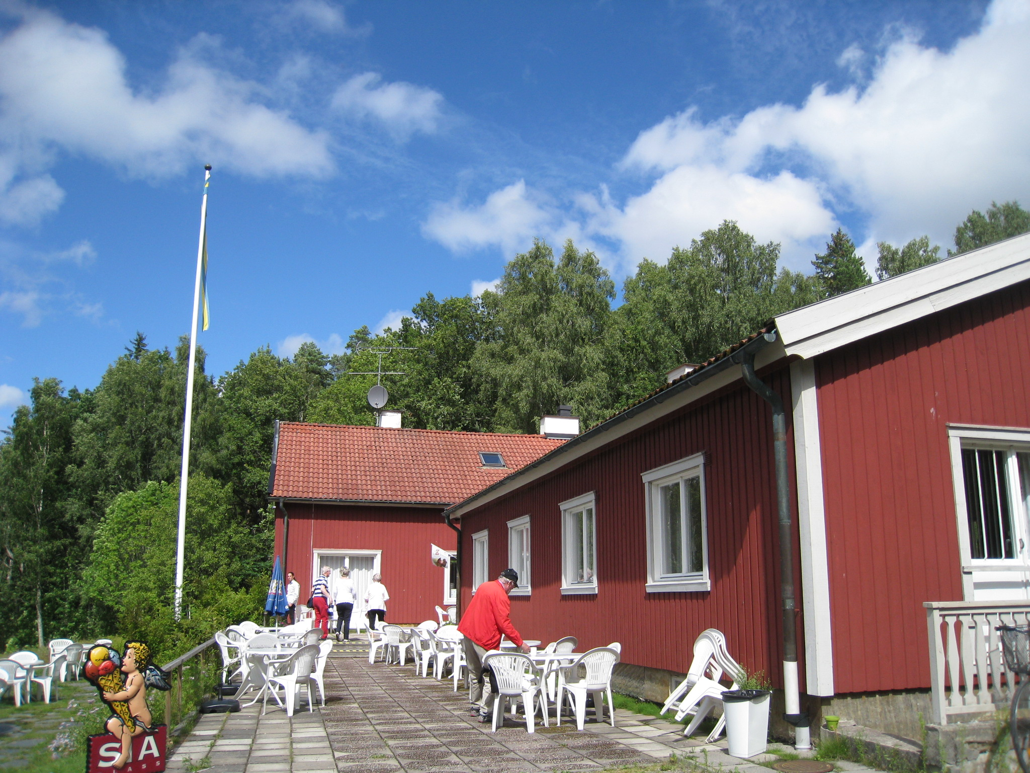 Baset sommarvilla och torpstuga ligger vid Mälaren mellan Görvälnsbadet och Sanduddens båthamn. Baset ligger i Görvälns naturreservat i Järfälla kommun, Stockholms län. Sedan 1984 hyr Järfälla pingstförsamling, Aspnäskyrkan, Baset för att användas till konferensverksamhet.